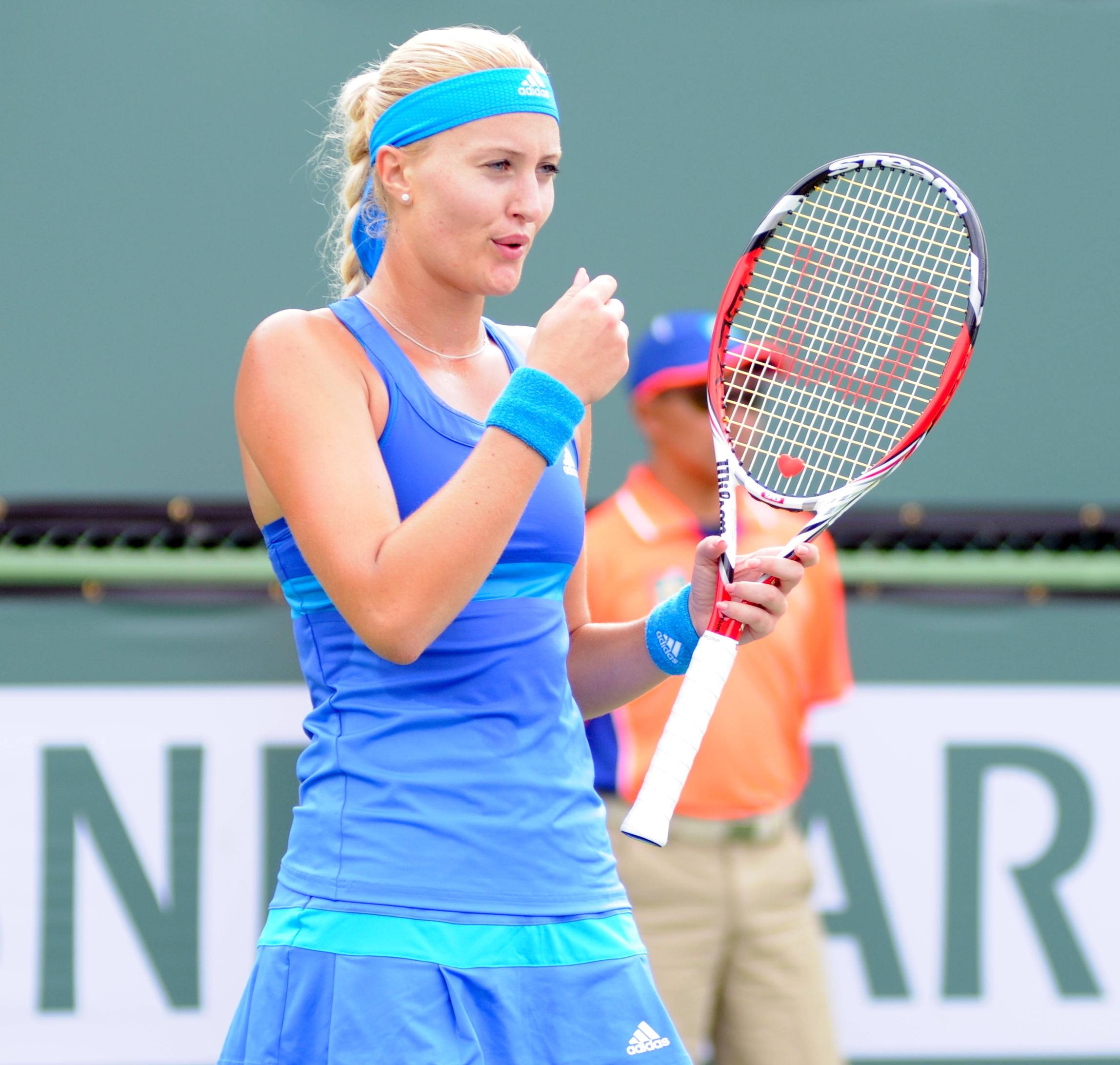 2014 BNP Paribas Open